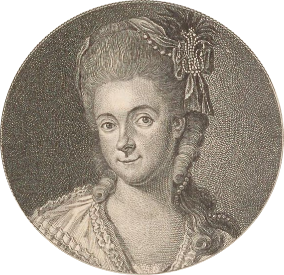 Kasimire von Anhalt-Dessau